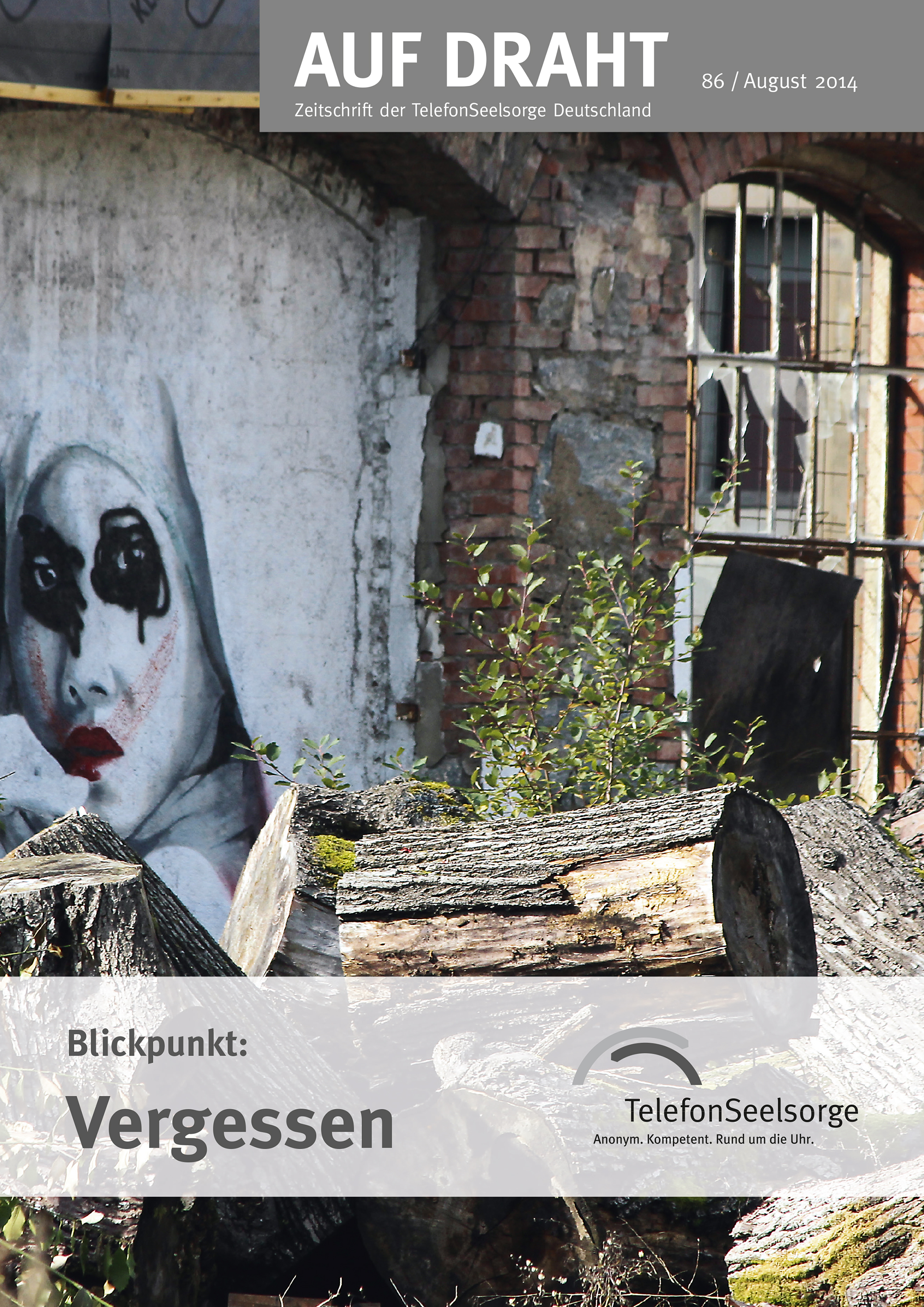 Auf Draht, Heft 86, 32. J., 2014